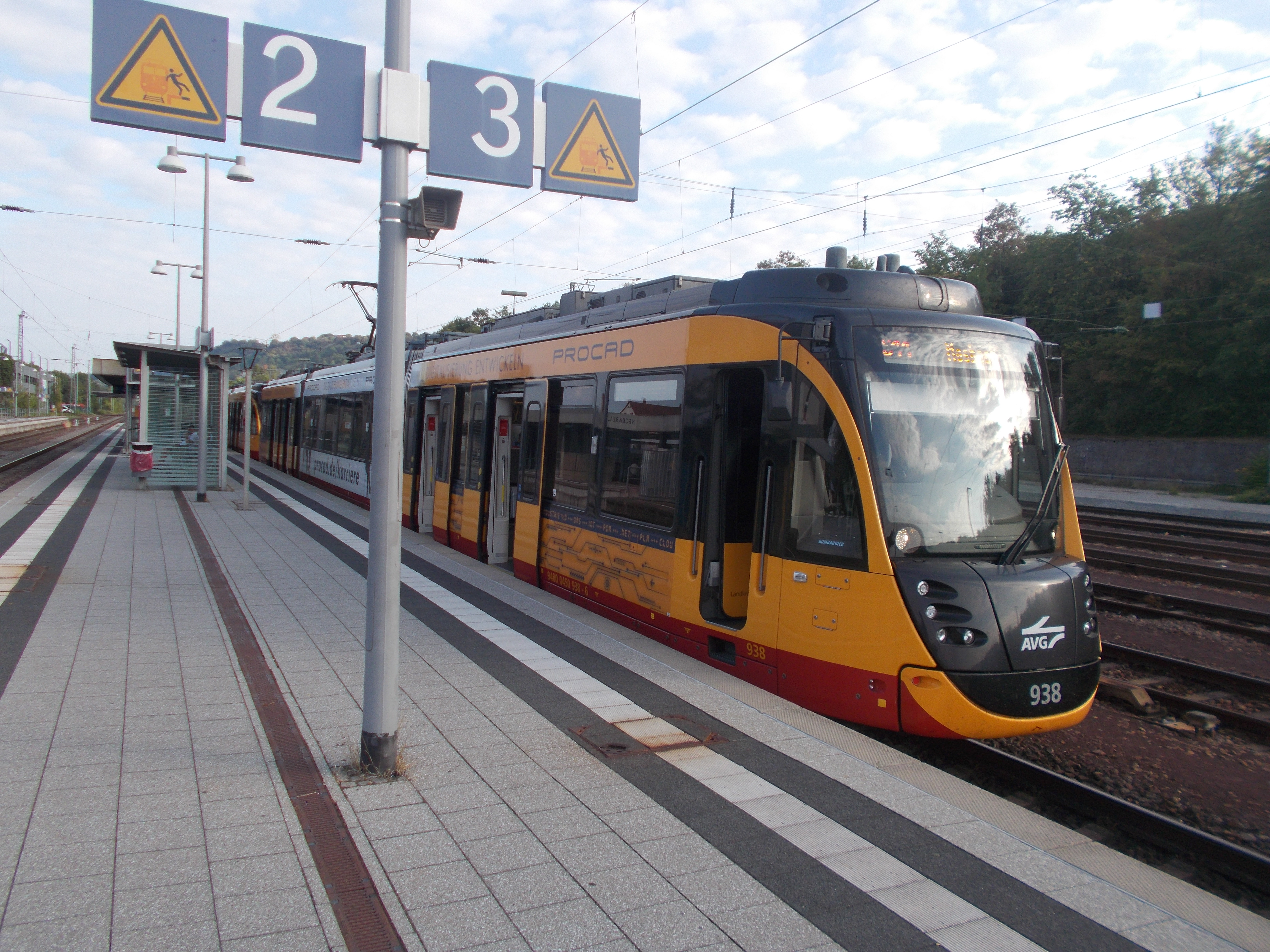 Stadtbahnwagen der Straßenbahn Karlsruhe/Heilbronn im Bahnhof Mosbach Neckarelz